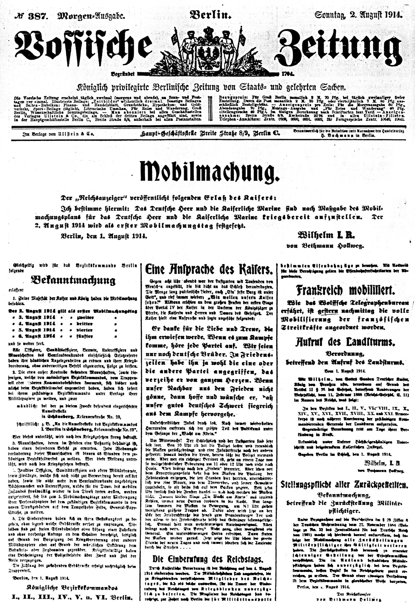 "Vossische Zeitung", Berlin. Title-page.